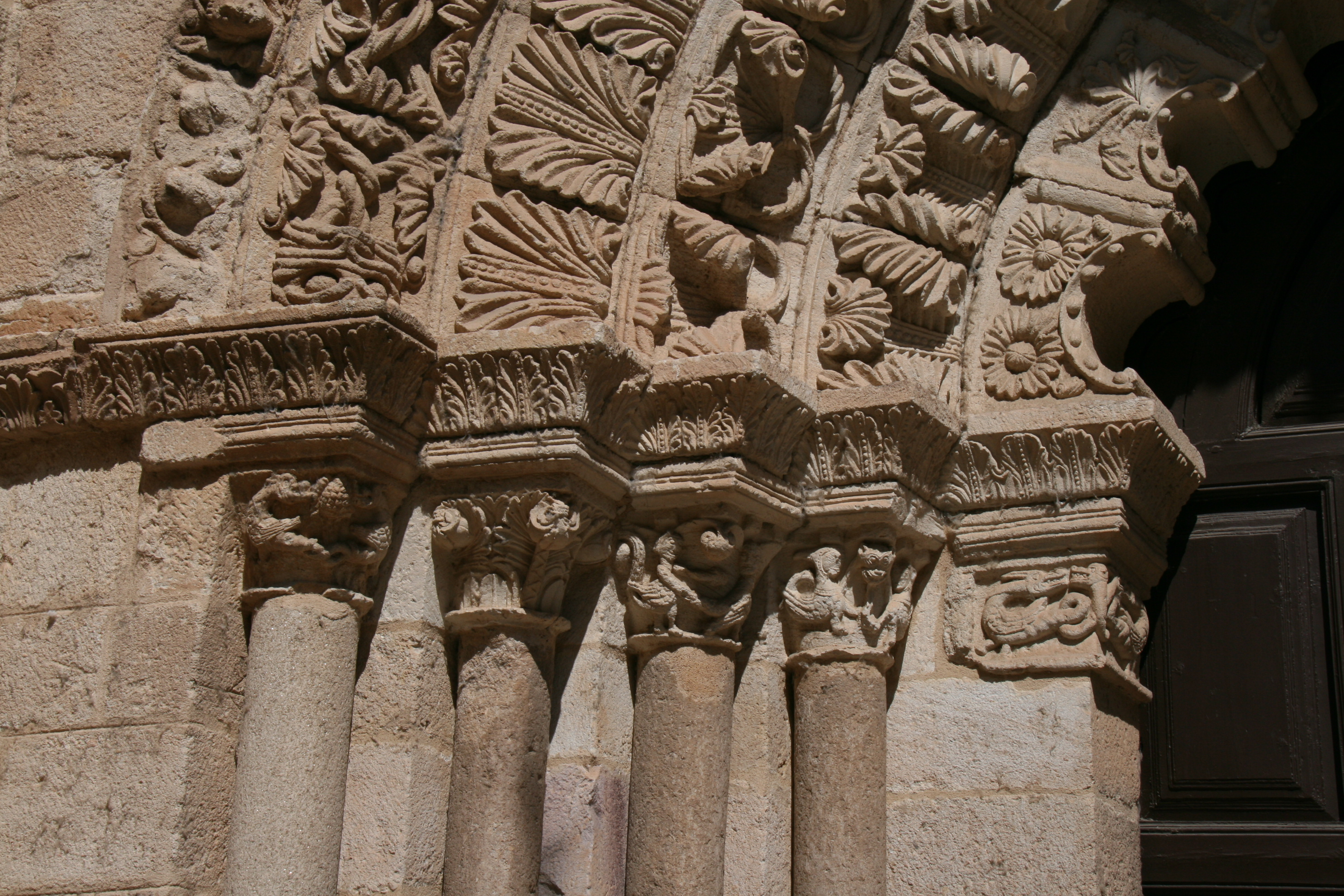 Imposta de la portada de entrada de Santa María Magdalena (Zamora)